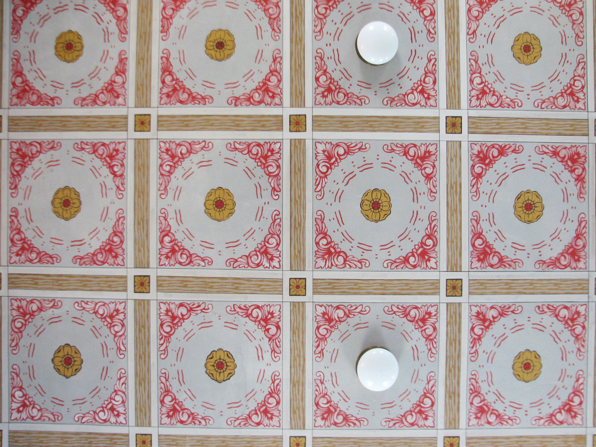 Die restaurierte Kassetten-Decke